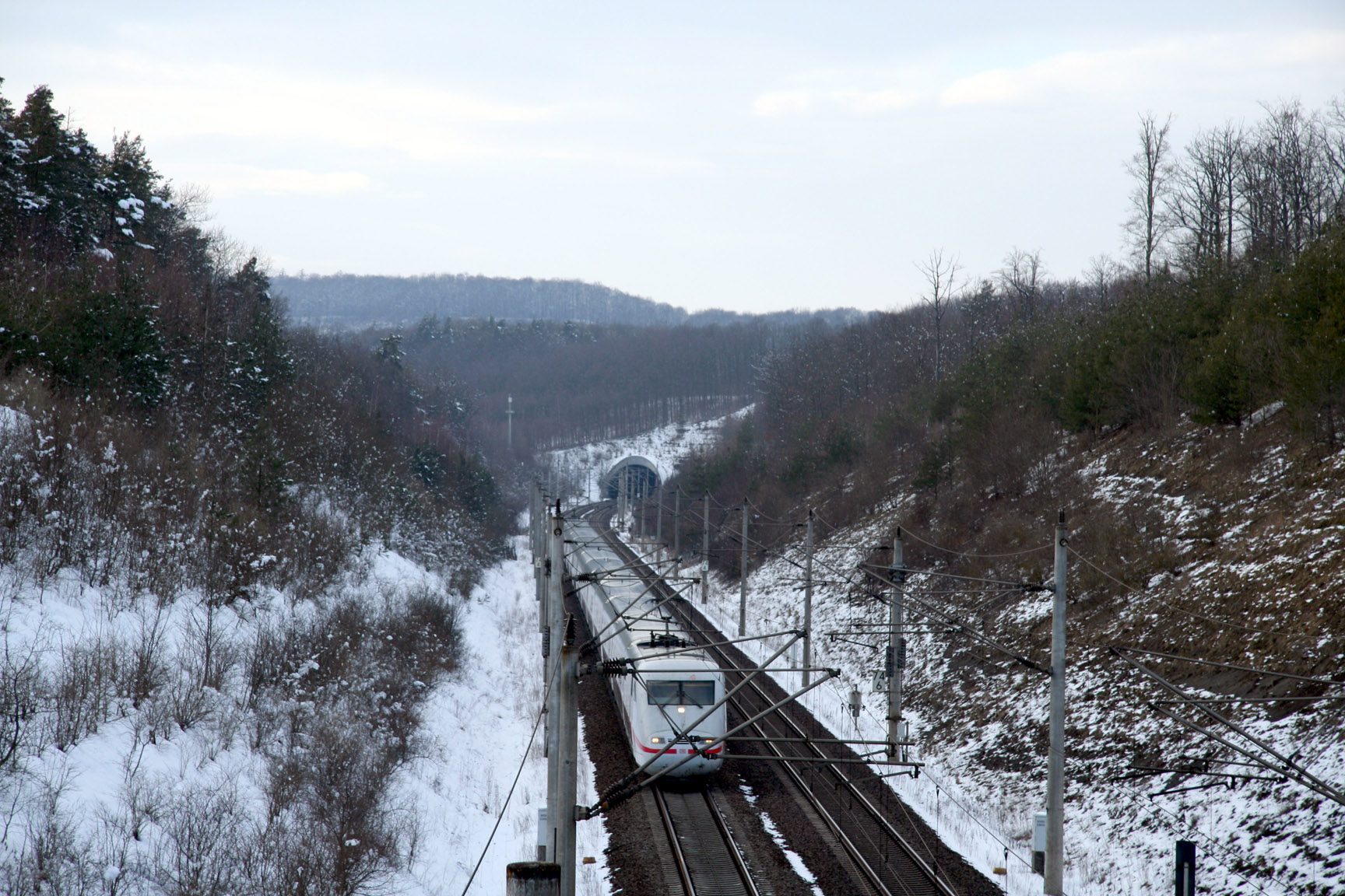 Bahnstrecke Mannheim-Stuttgart bei Illingen